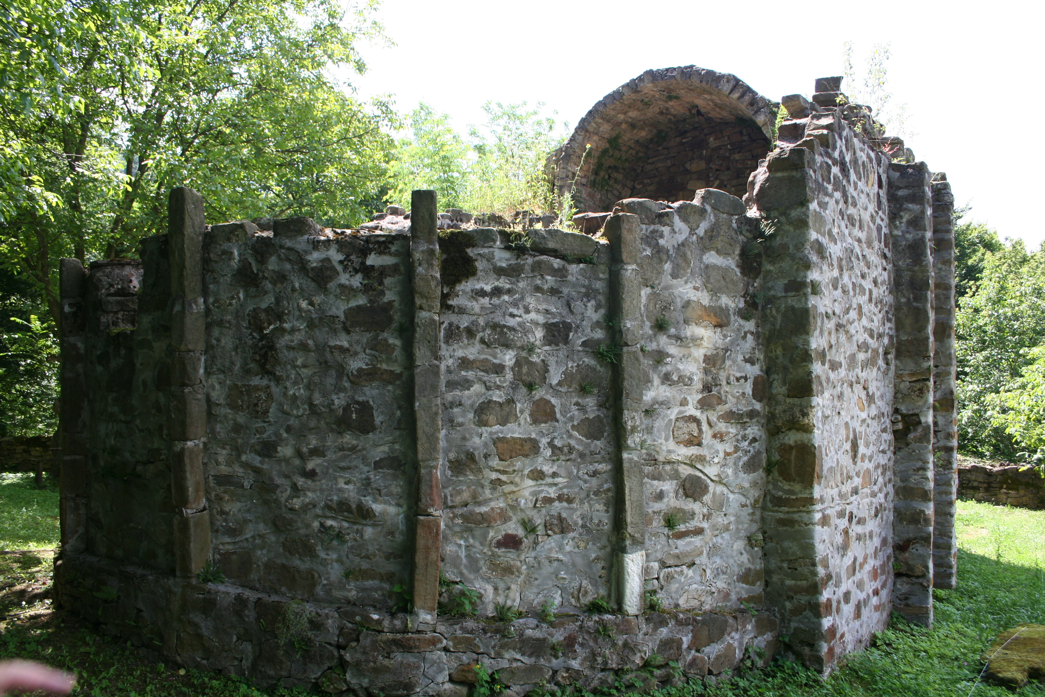 Ostaci manastira Vavedenja Presvete Bogorodice, Slavkovica